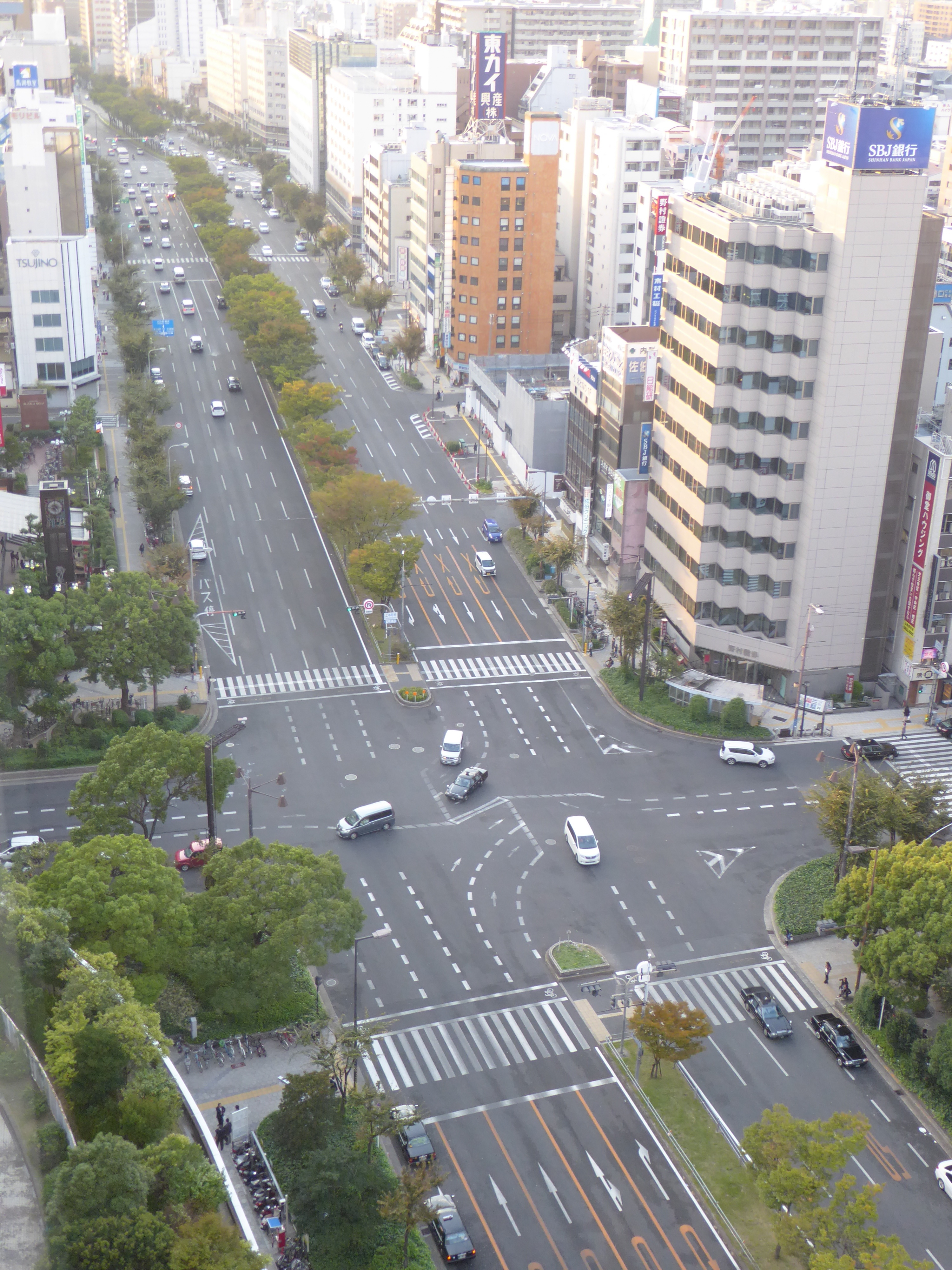 上本町六丁目交差点を西方向に見る。